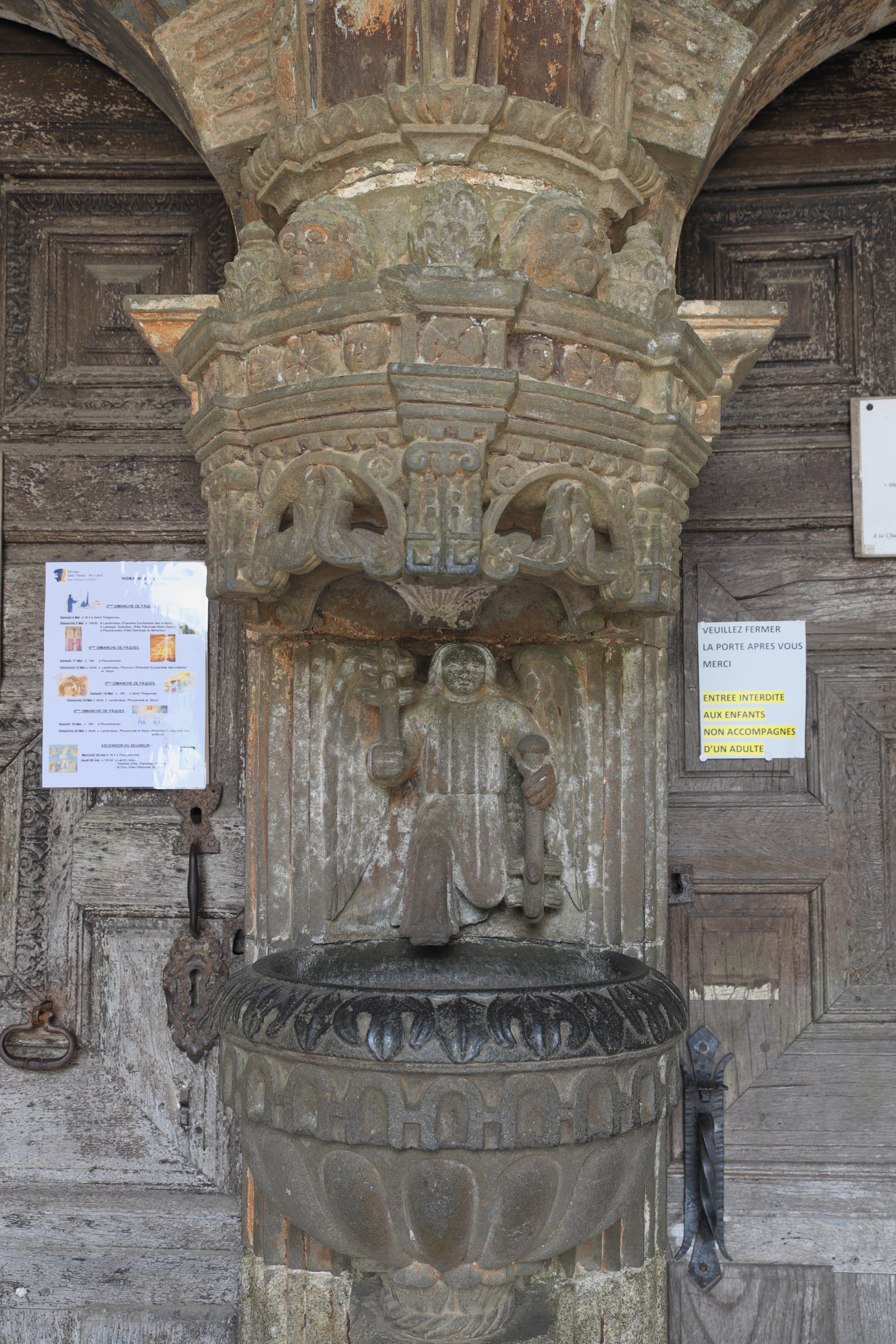 Katholische Pfarrkirche Saint-Miliau in Guimiliau im Département Finistère (Region Bretagne/Frankreich), Weihwasserbecken in der südlichen Vorhalle